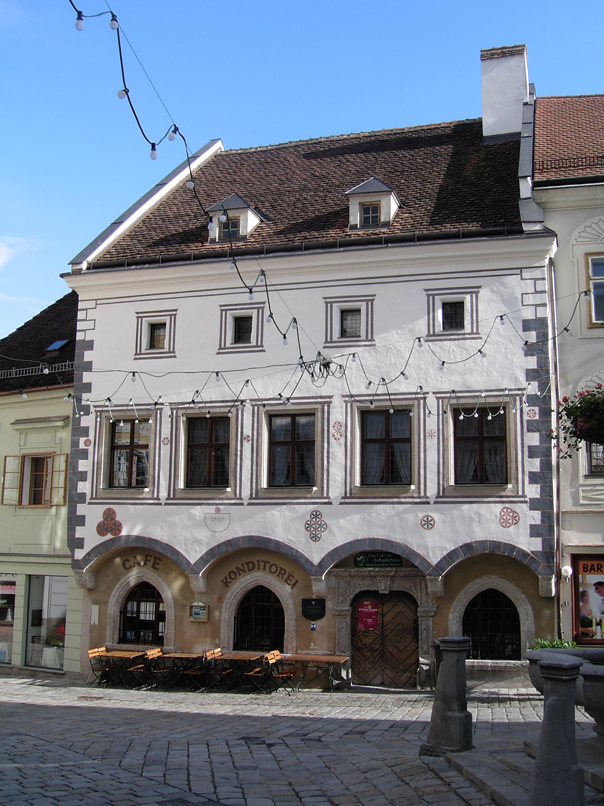 Steyr Sierninger Straße 1 Lebzelterhaus Ansicht Fassade Sierninger Straße